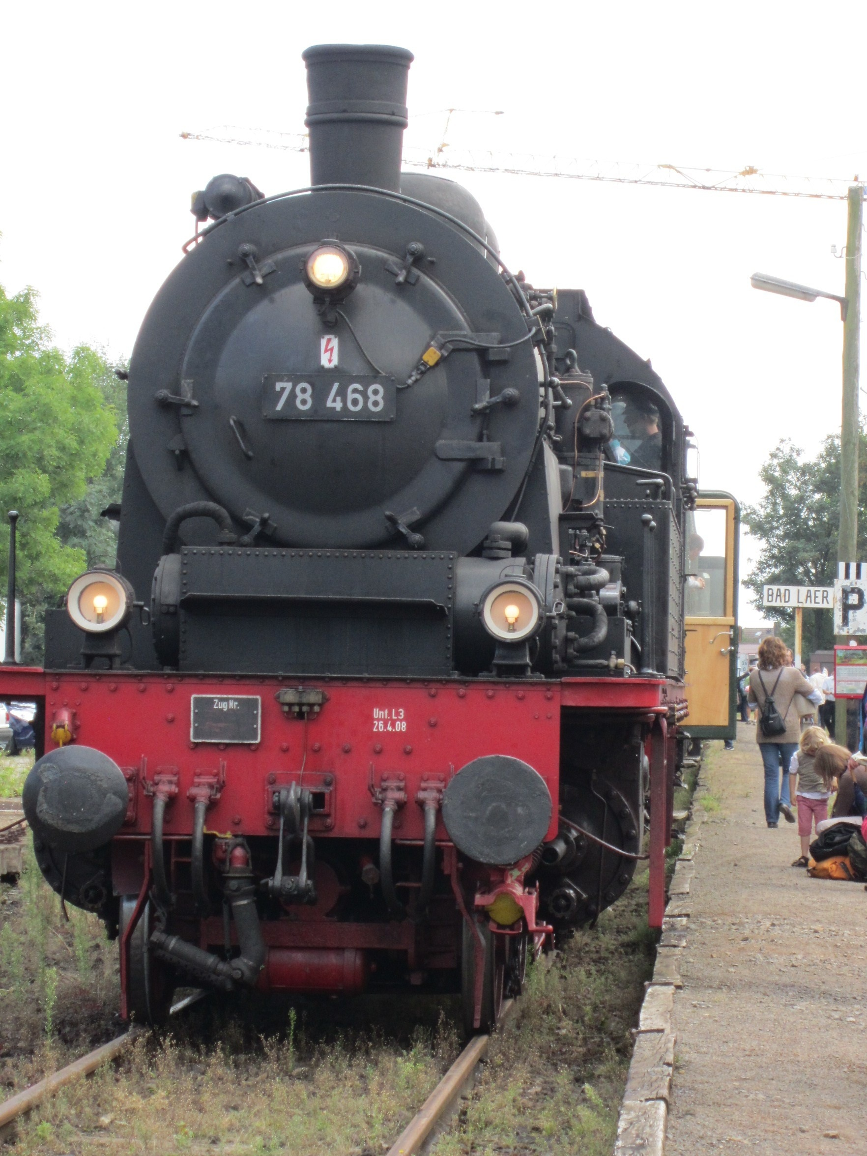 Dampfzug der Teutoburger Waldeisenbahn in Bad Laer.